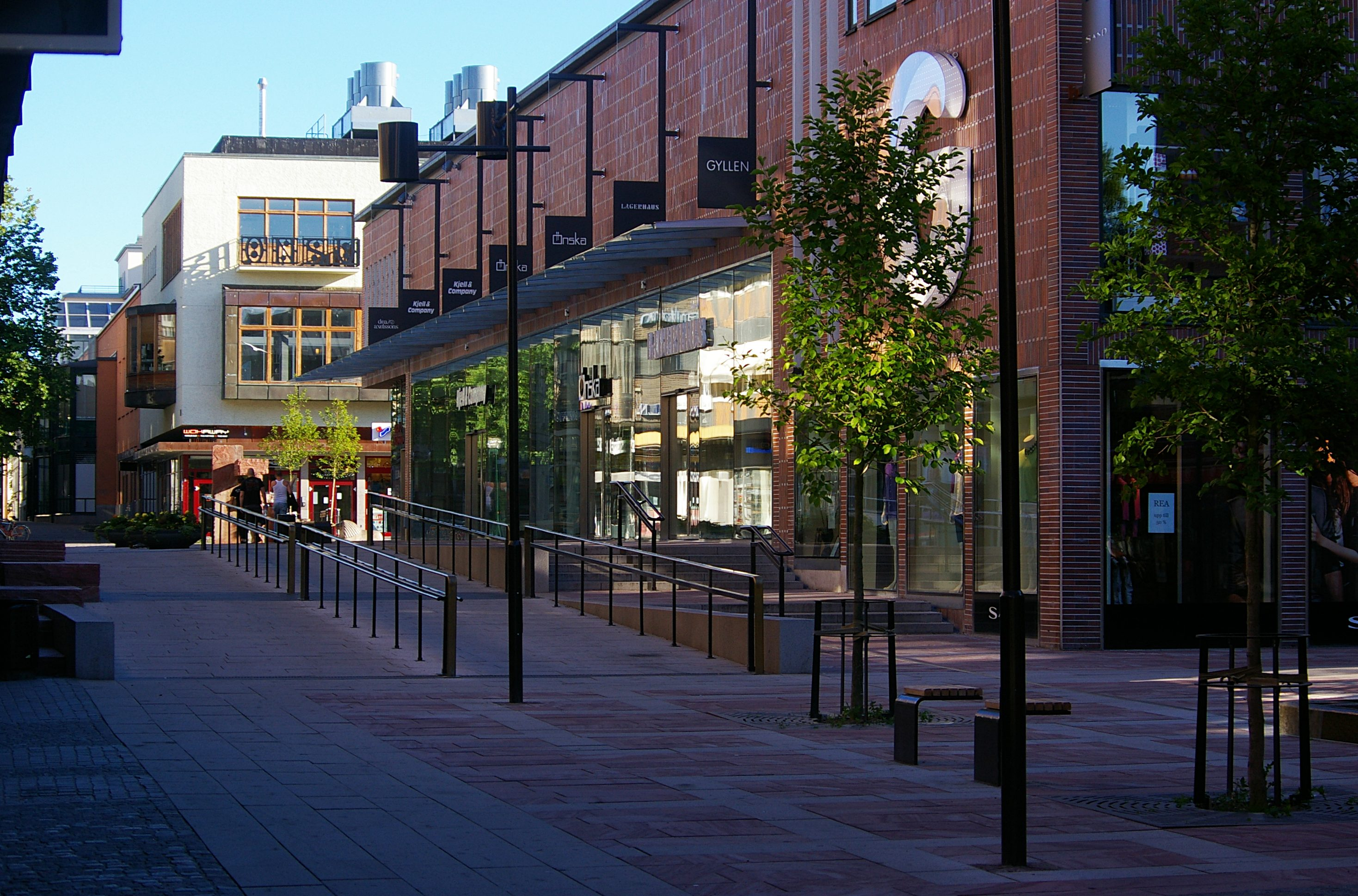 Köpgallerian Gyllenhuset till höger, bakom det gallerian Gränden och däremellan Lilla torget. Linköpings innerstad.